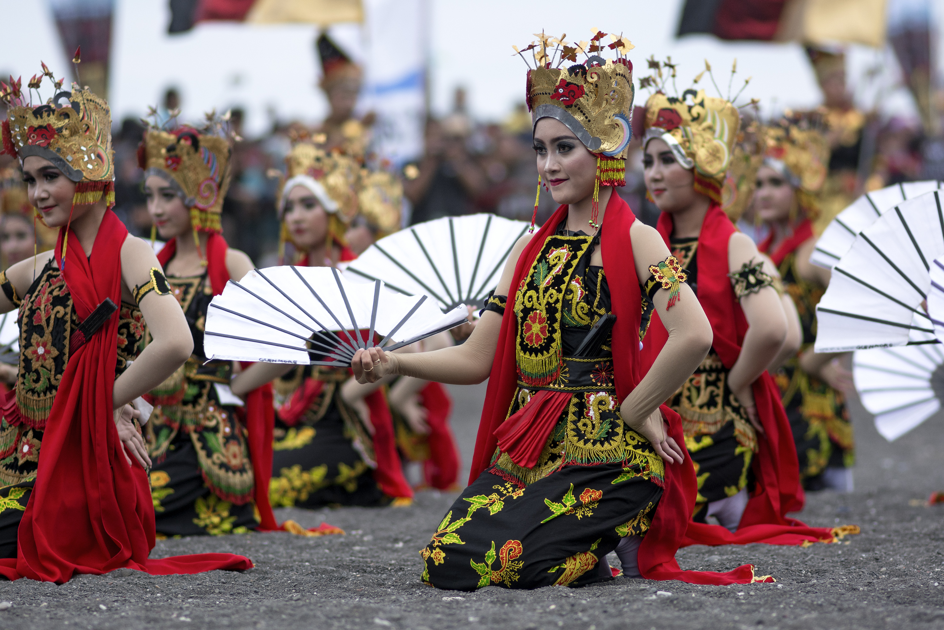 Pementasan Tarian gandrung sewu di Banyuwangi